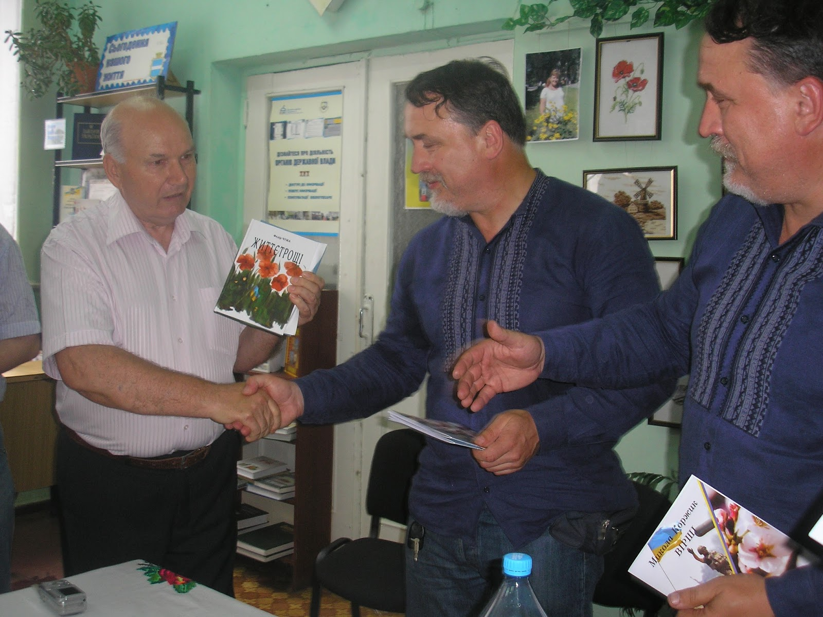 Зустріч відбулася в місті Кременчуці у 2016 році.